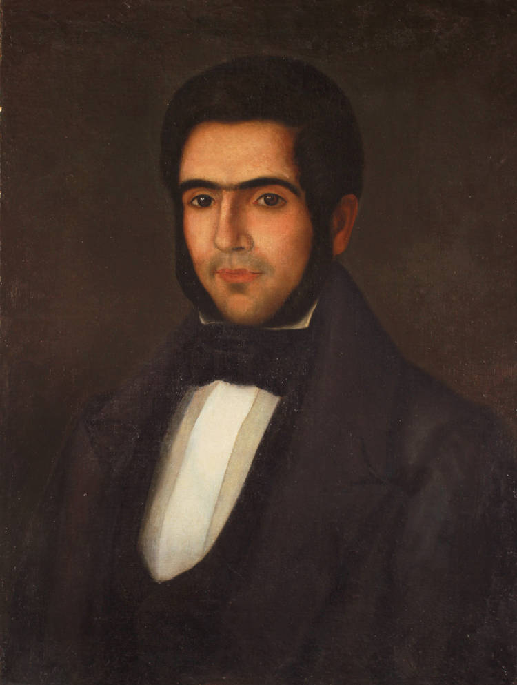 Retrato de Carlos Morel.